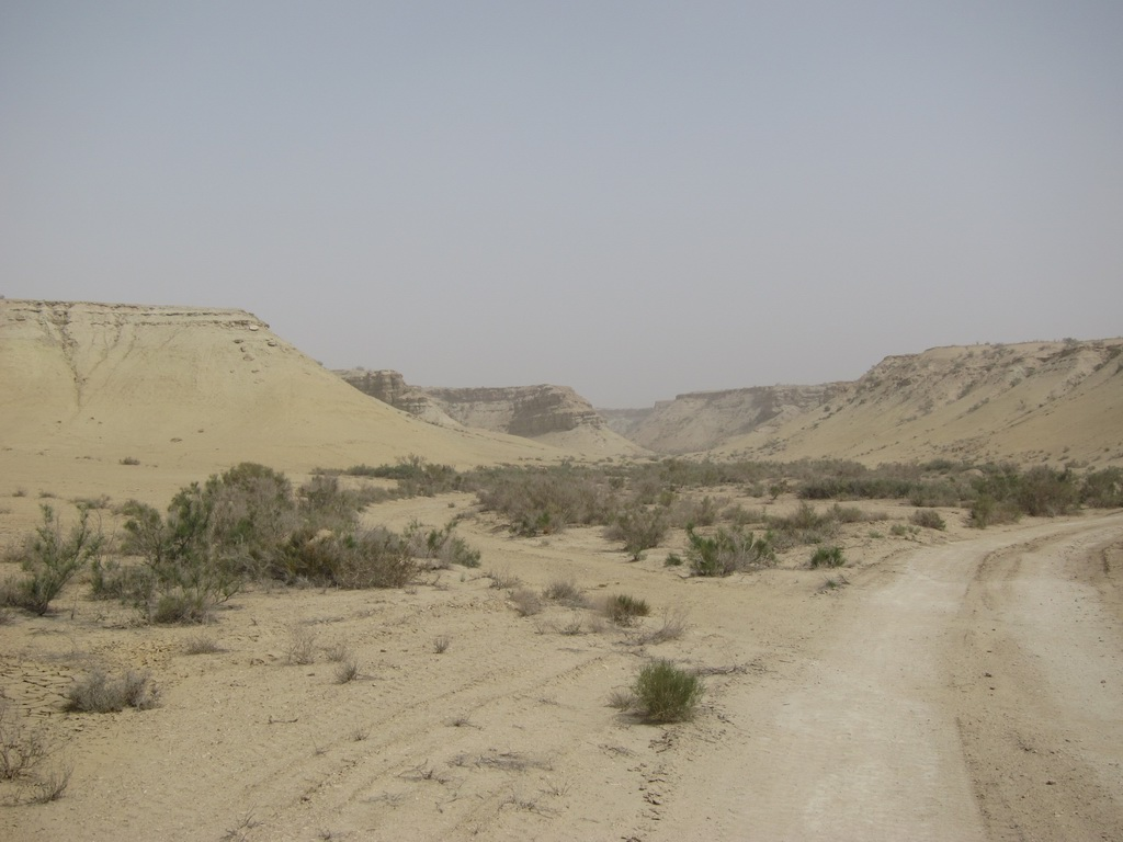 Ассаке-Аудан, плато Устюрт. Спасибо сайту